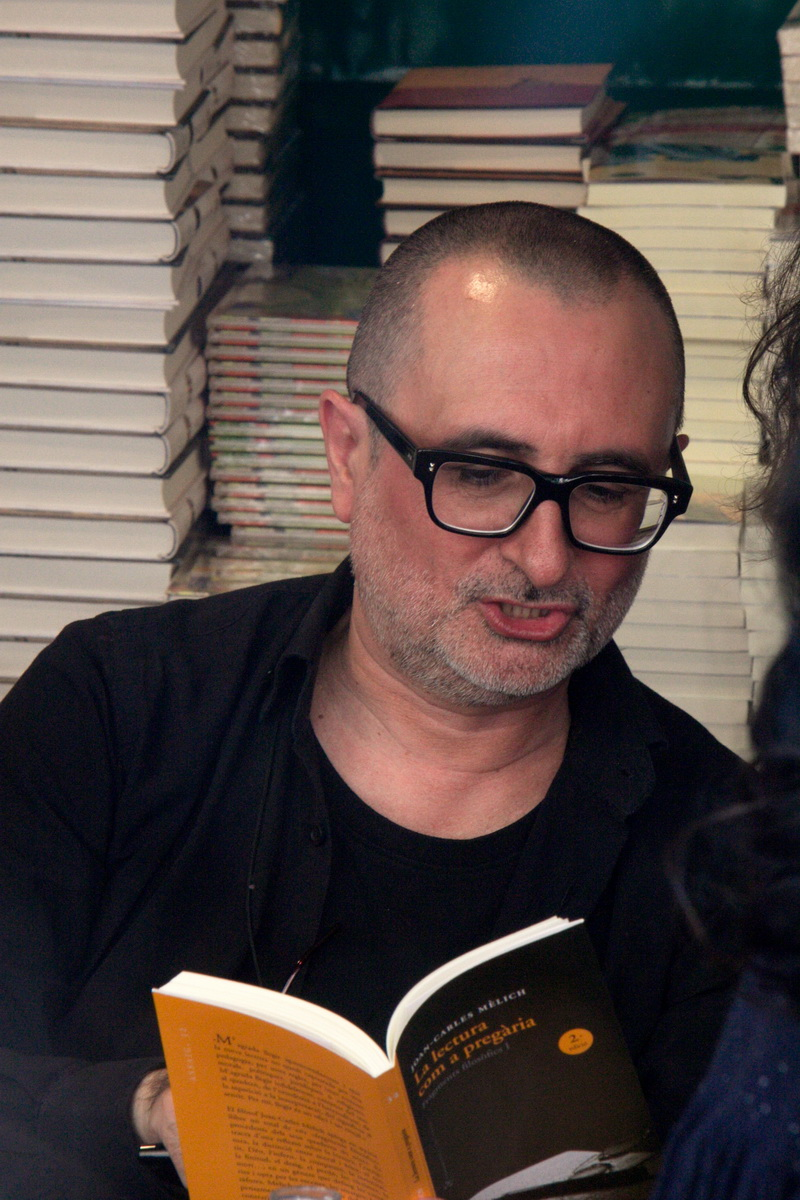 Signatura de llibres en la Diada de Sant Jordi-2015 a Barcelona